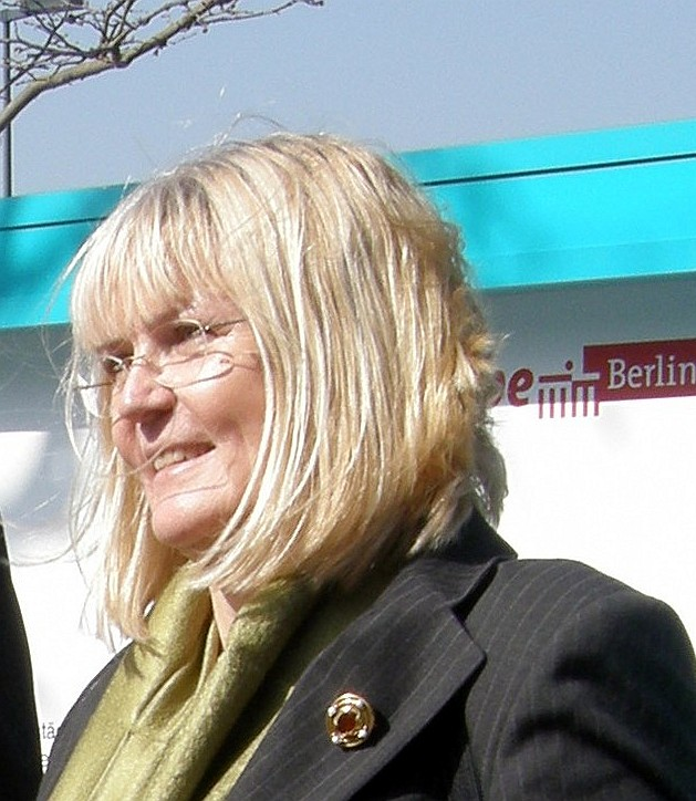 Hella Dunger-Löper, Staatssekretärin für Bauen und Wohnen der Senatsverwaltung für Stadtentwicklung des Landes Berlin, bei der Eröffnung einer Ausstellung vor dem Bahnhof Südkreuz am 7. April 2011.